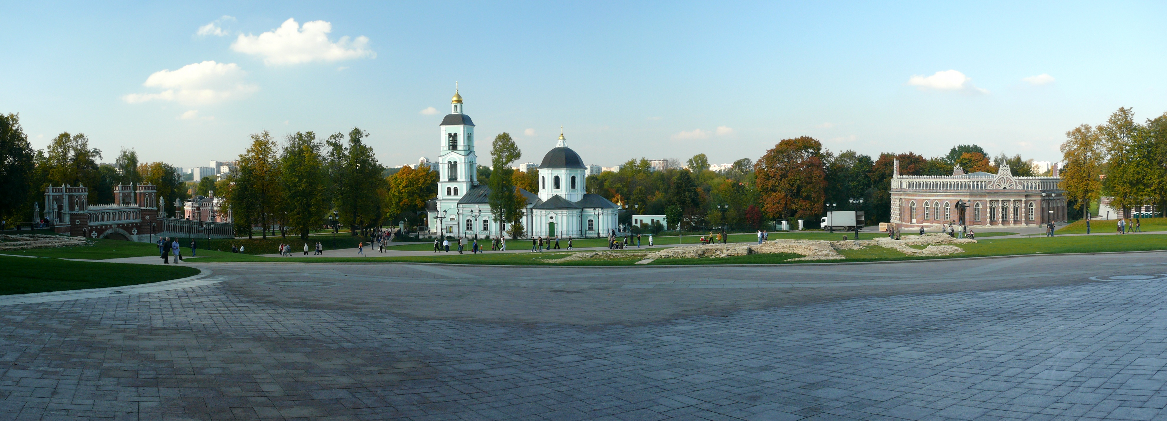 Blick vom Schloss im Moskauer Zarizyno-Park nach Norden. In der Mitte die Nikolauskirche.